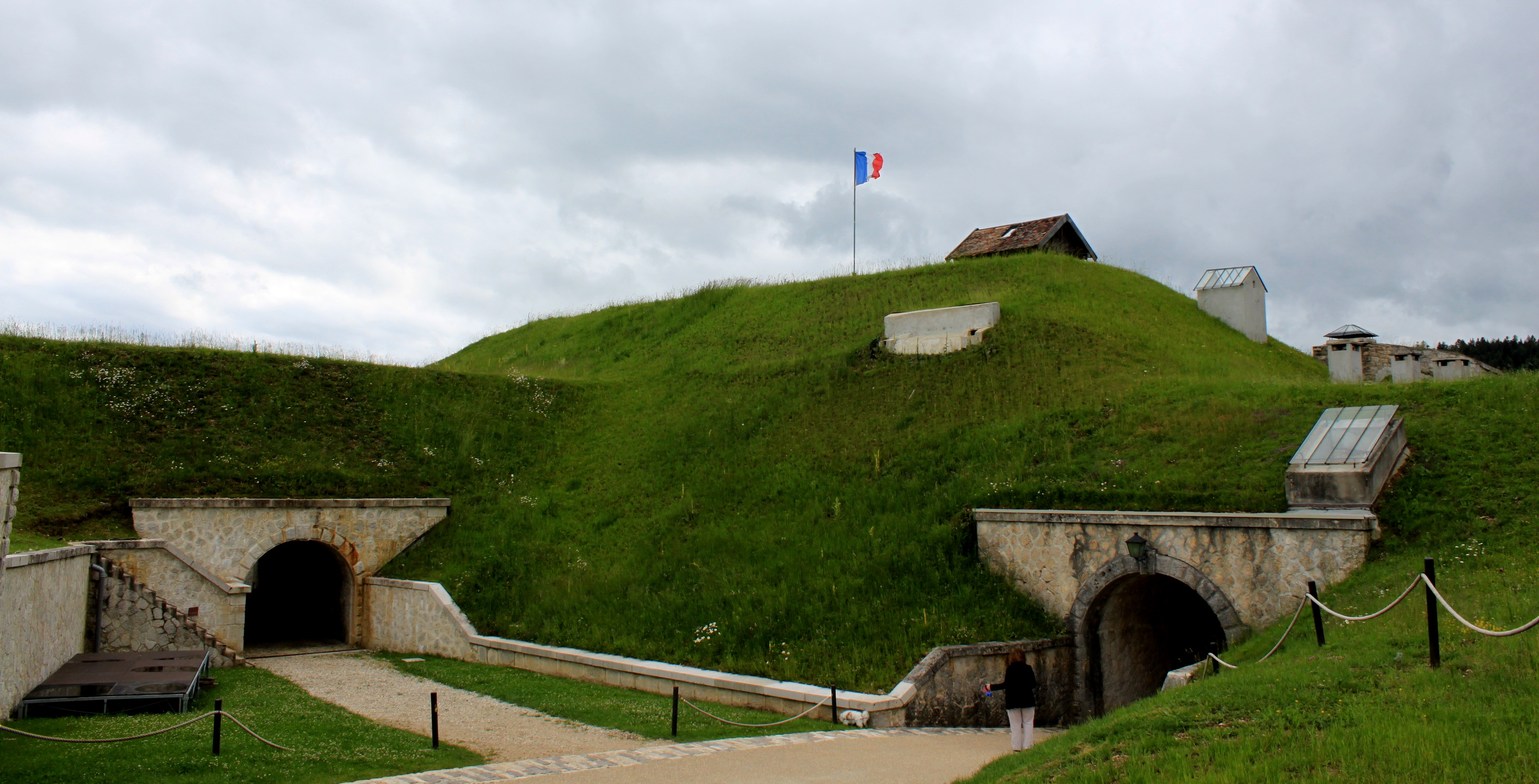 Fort de Joux, Doubs, Franche-Comté, France